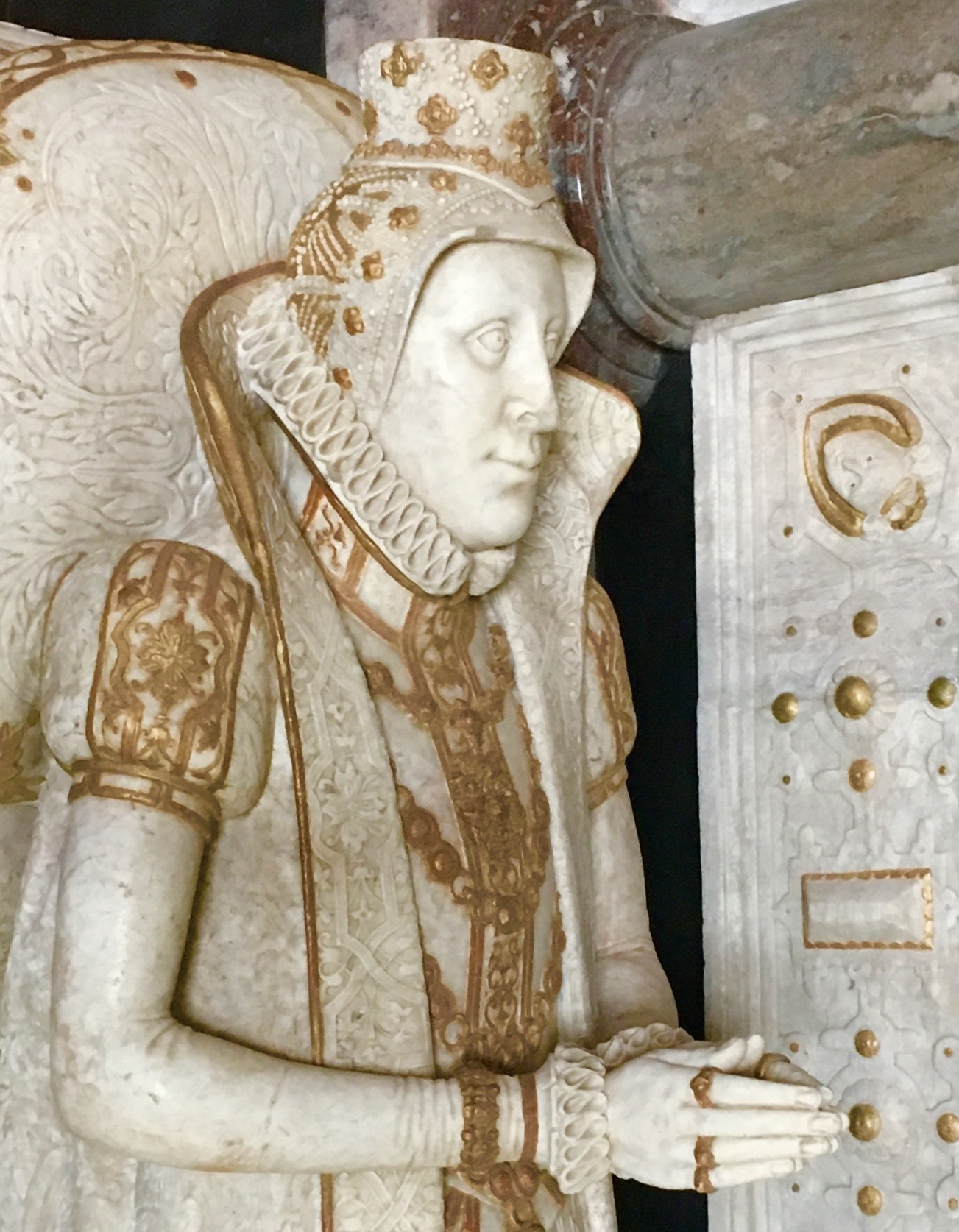 Dorothea af Danmark, detalje fra gravminde i Güstrow Katedral af Philip Brandin